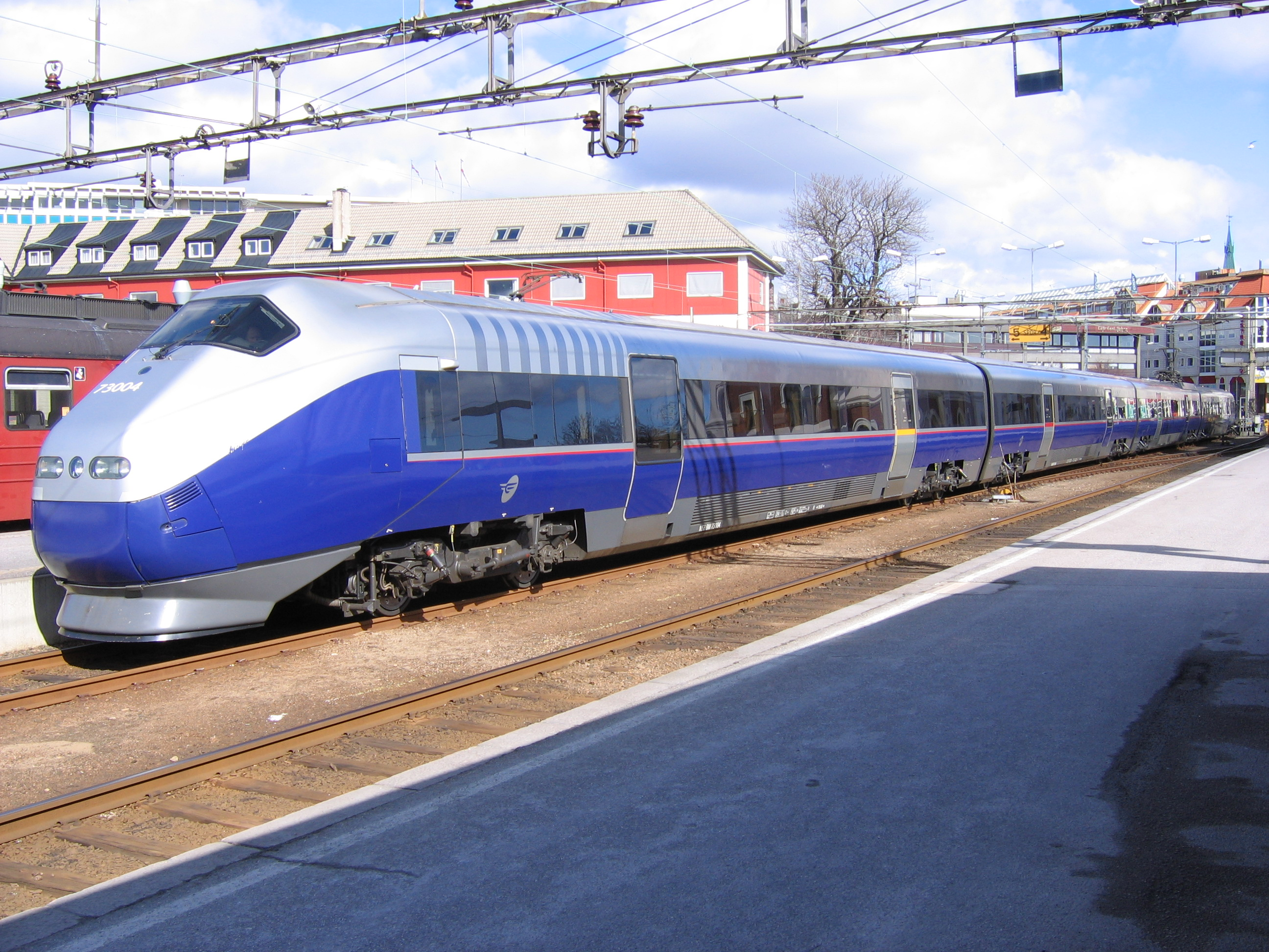 BM73 in Kristiansand